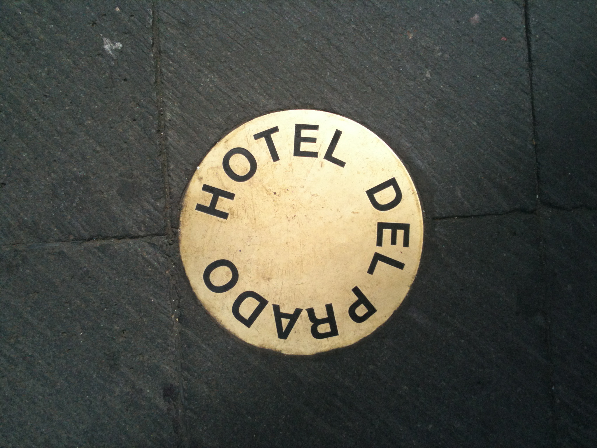 Señal que indica el límite del desaparecido Hotel del Prado en el suelo del actual Hilton Ciudad de México.